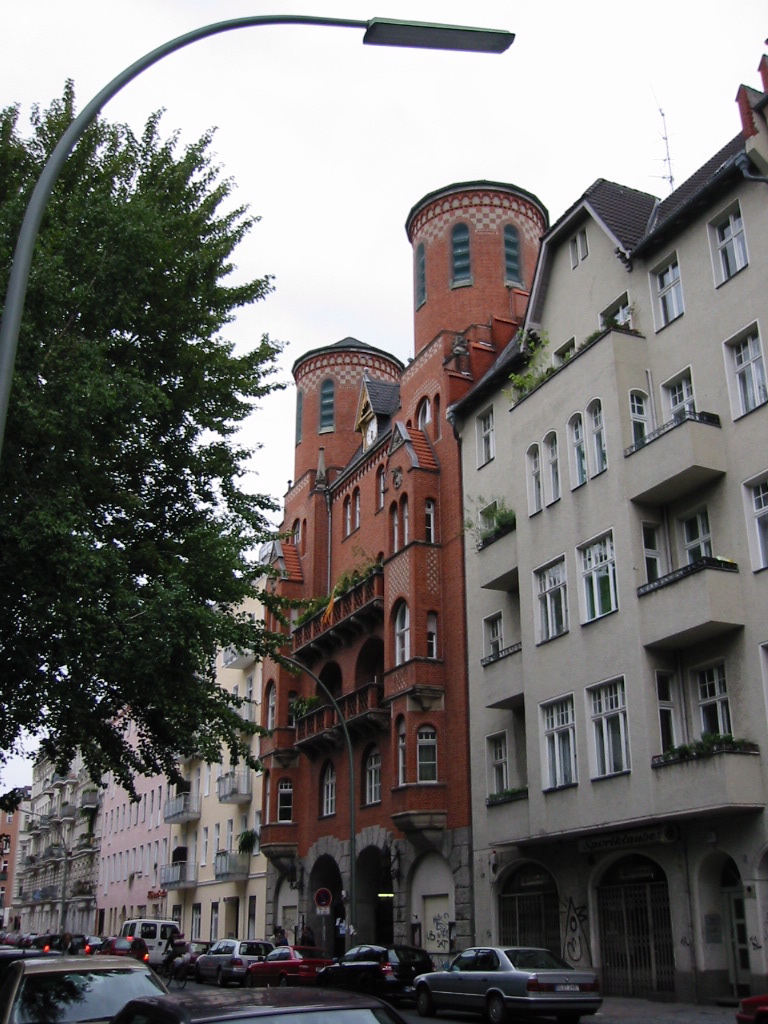 Marthakirche, Glogauer Straße, Berlin Kreuzberg, Vorderhaus